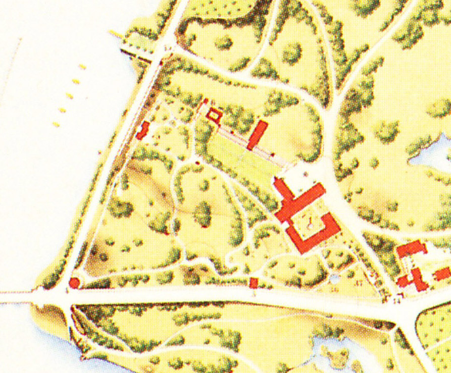 Kraatzplan 1862, Ausschnitt Pleasureground